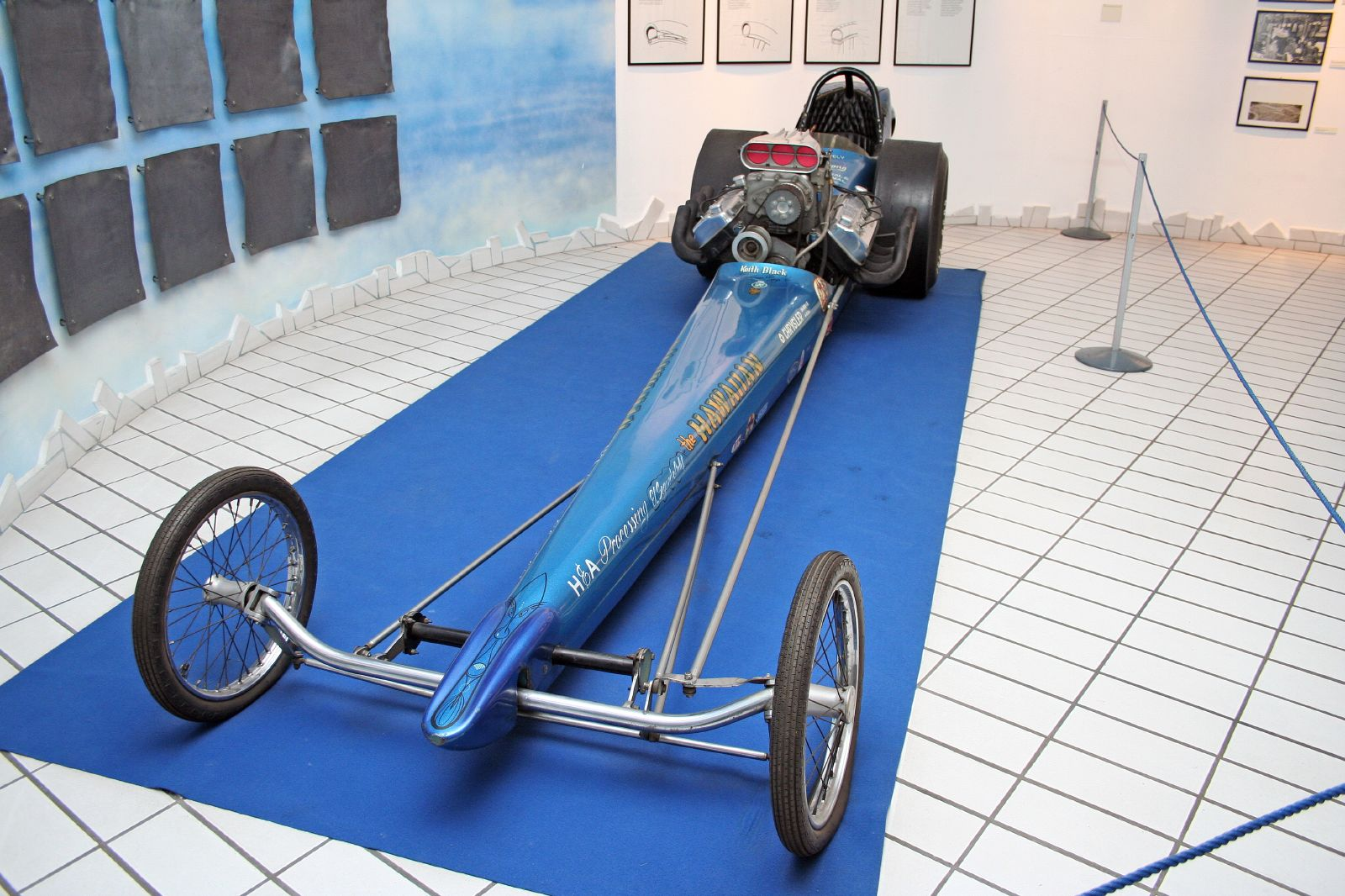 "Hawaiian" Vintage Dragster (engine builder Keith Black)